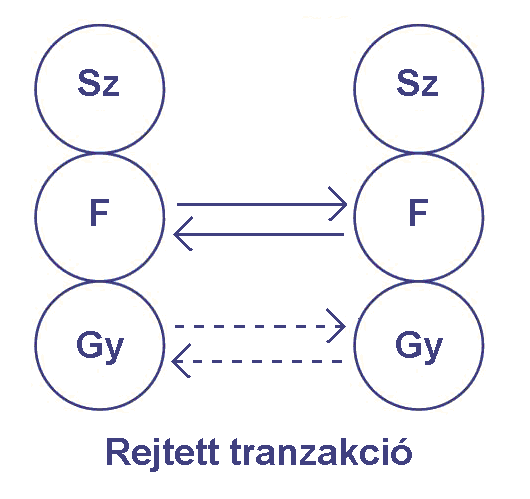 Rejtett tranzakció a játszmaelméletben